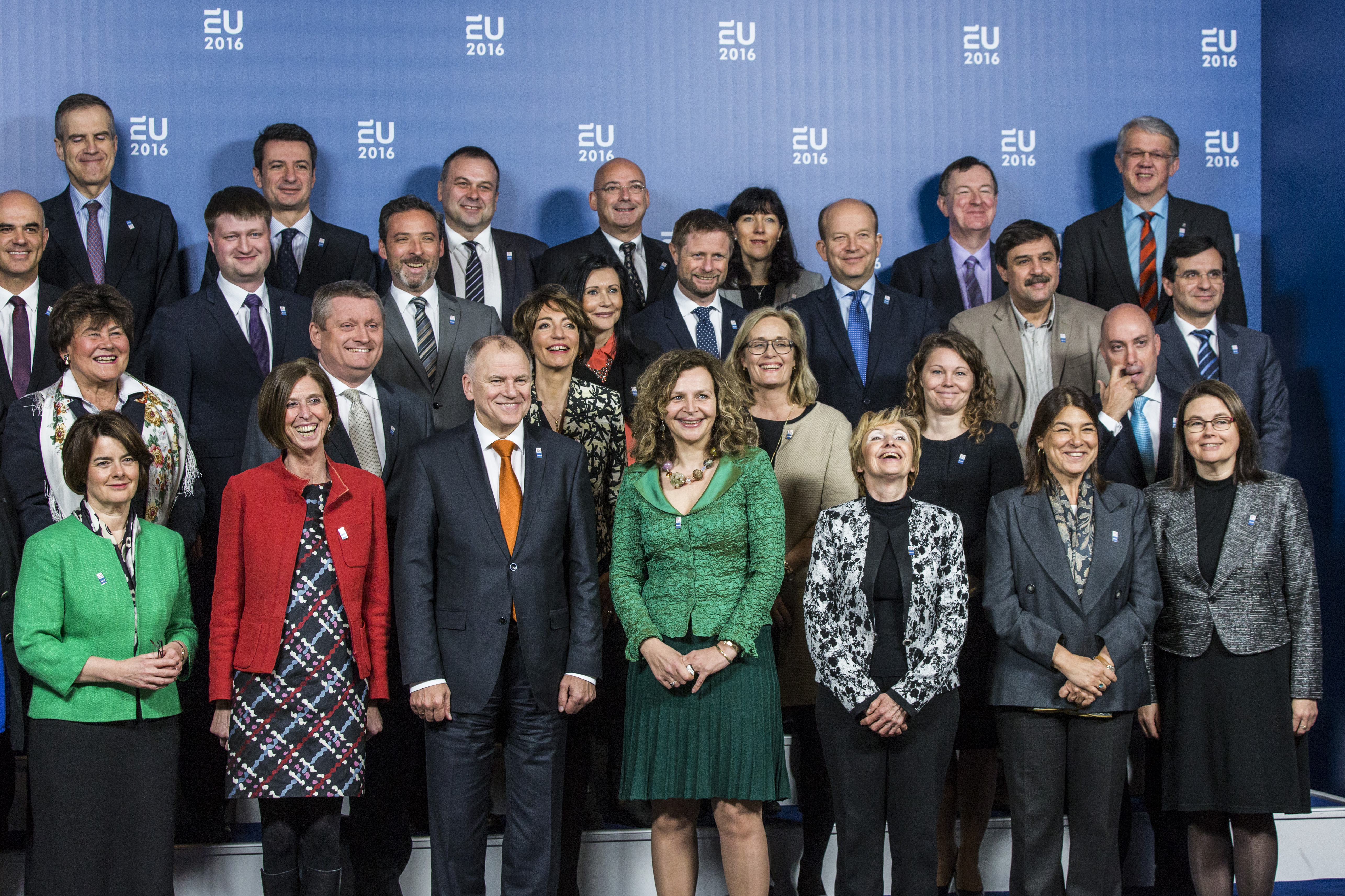 Amsterdam, 18 april 2016 / Amsterdam, April 18th 2016. Raad Werkgelegenheid, Sociaal Beleid, Gezondheid en Consumentenzaken (Gezondheid) met minister van VWS Edith Schippers. Informal Meeting of Ministers of Health with Dutch minister Edith Schippers. Foto: Rijksoverheid/Valerie Kuypers – Photograph: Dutch Government/Valerie Kuypers